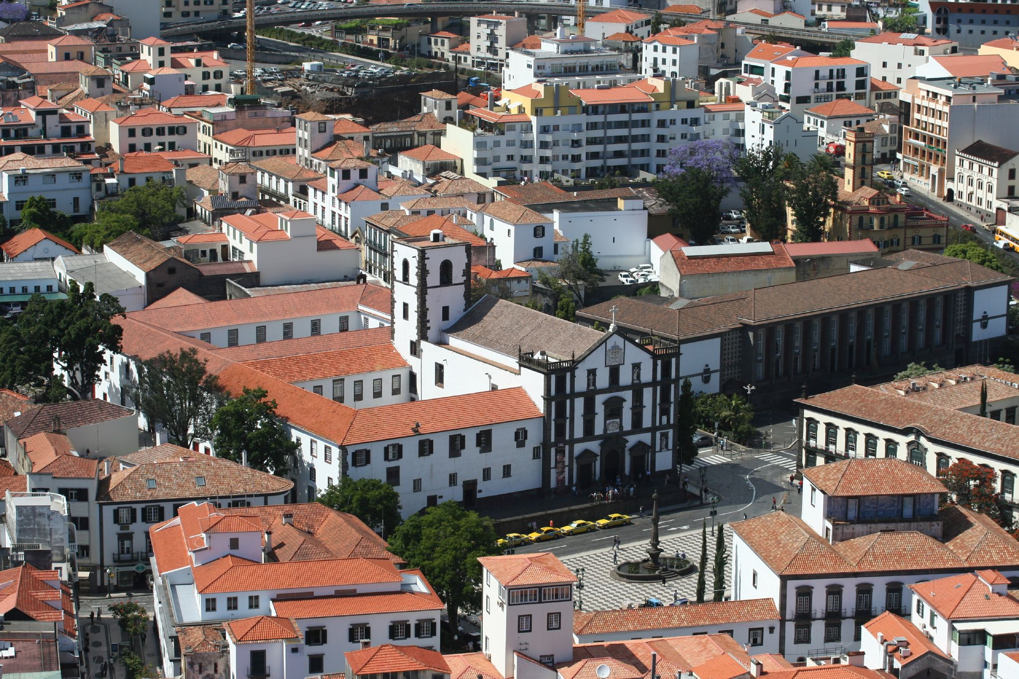 UMA, Funchal